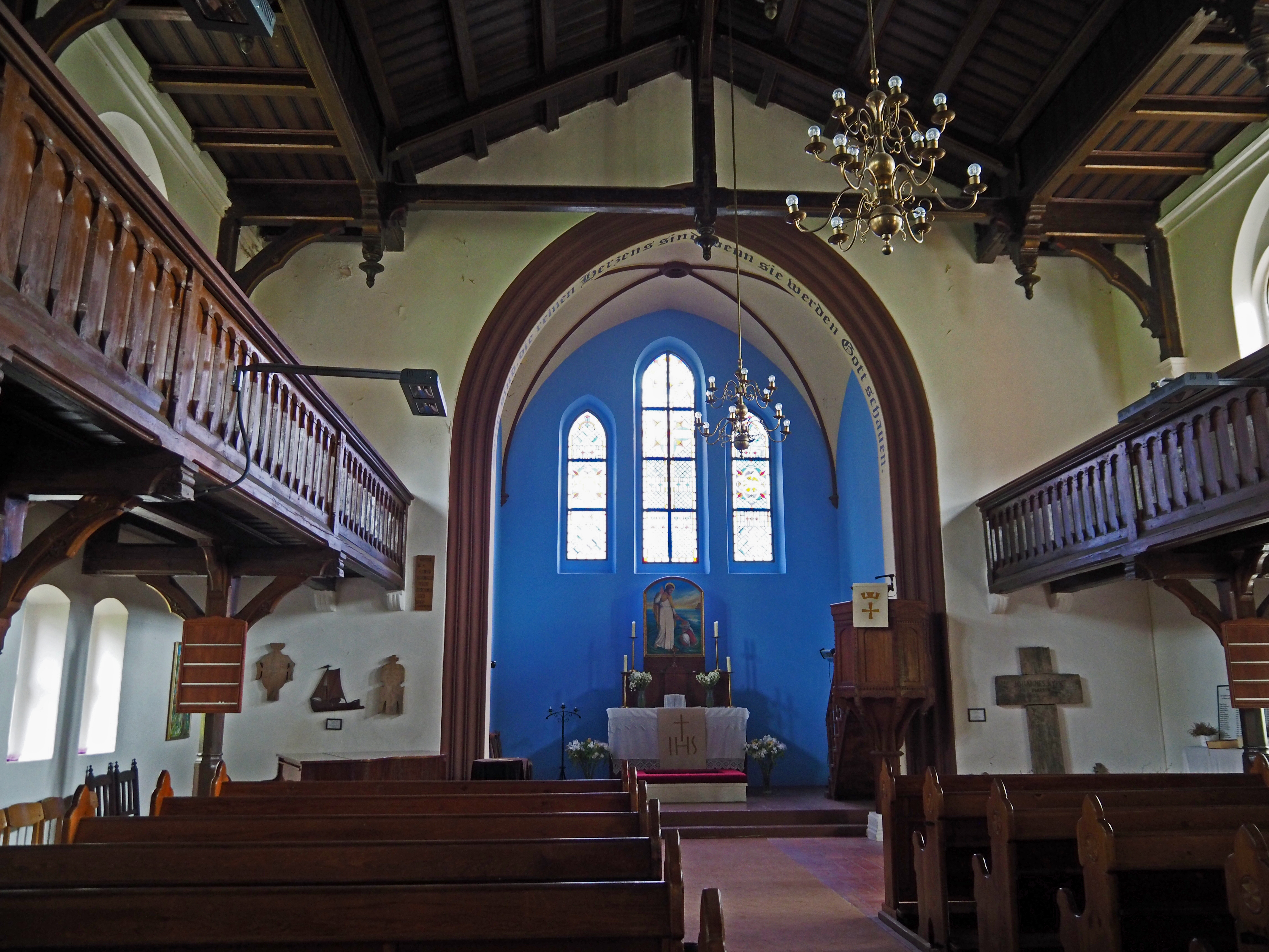 Im Innern der Evangelischen Kirche in Nidden (Kurische Nehrung)